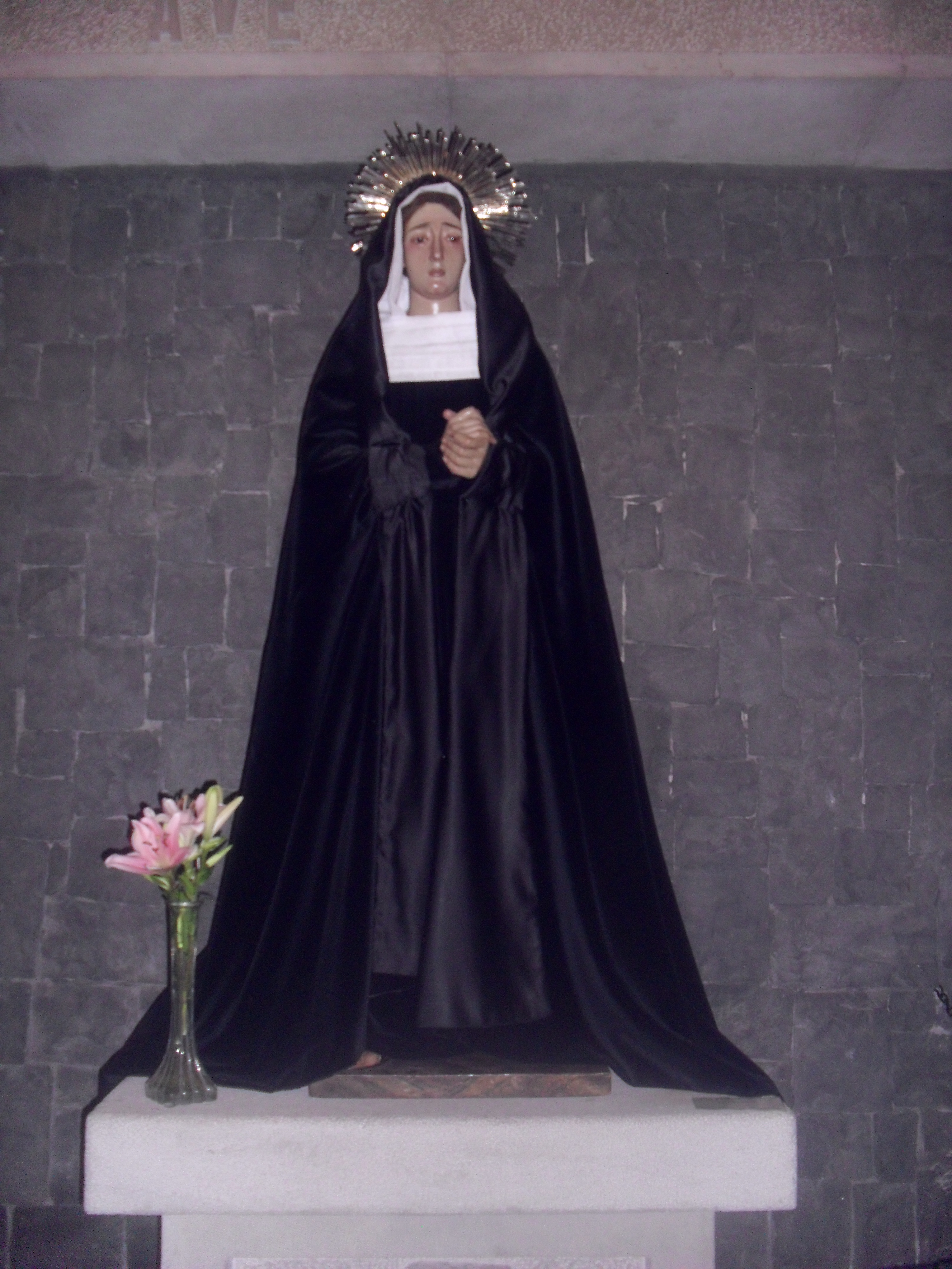 Imagen de Nuestra Señora la Virgen de las Angustias venerada en la Iglesia de Nuestra Señora del Pilar en Santa Cruz de Tenerife.